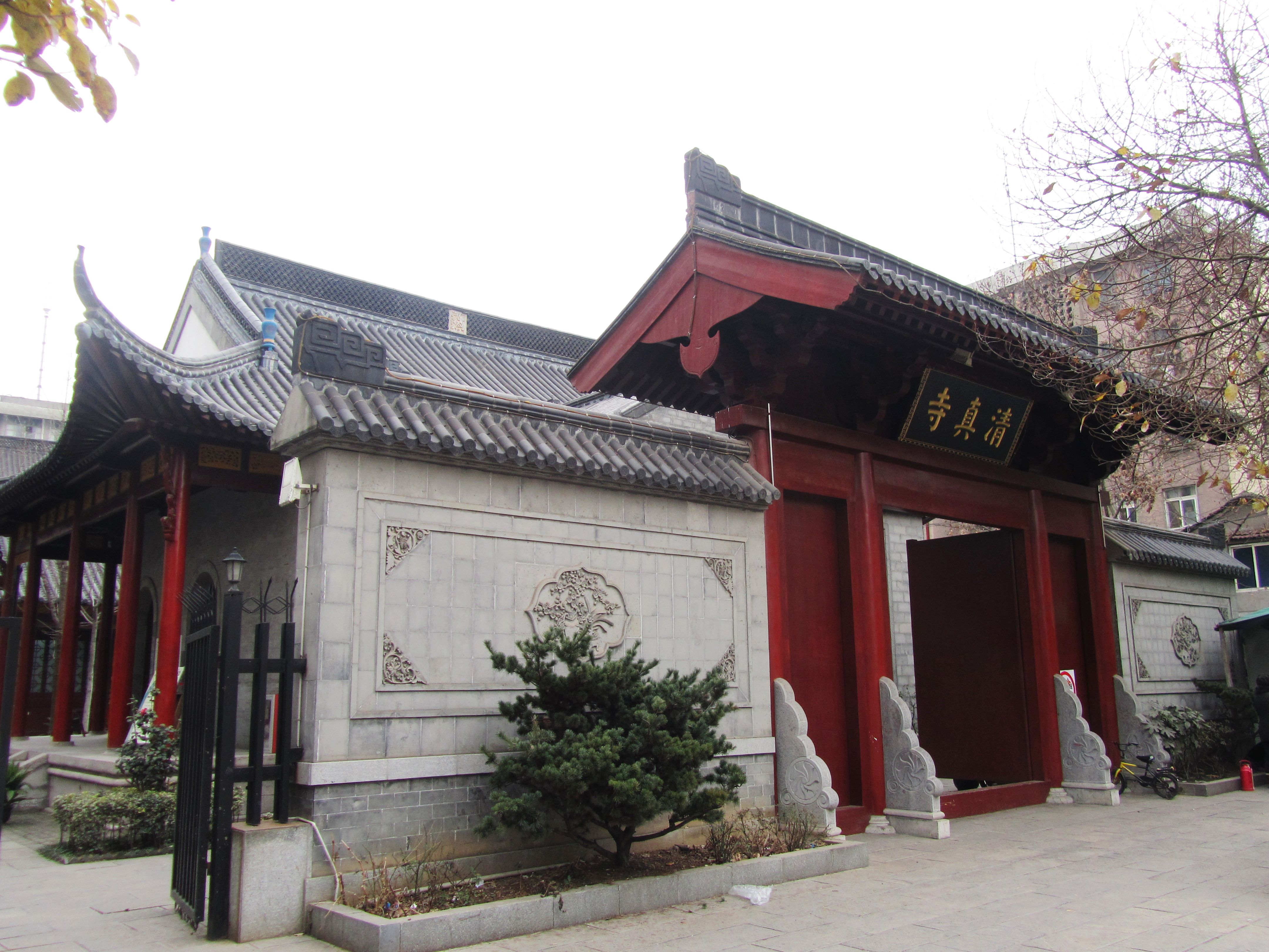 南京草桥清真寺大门。